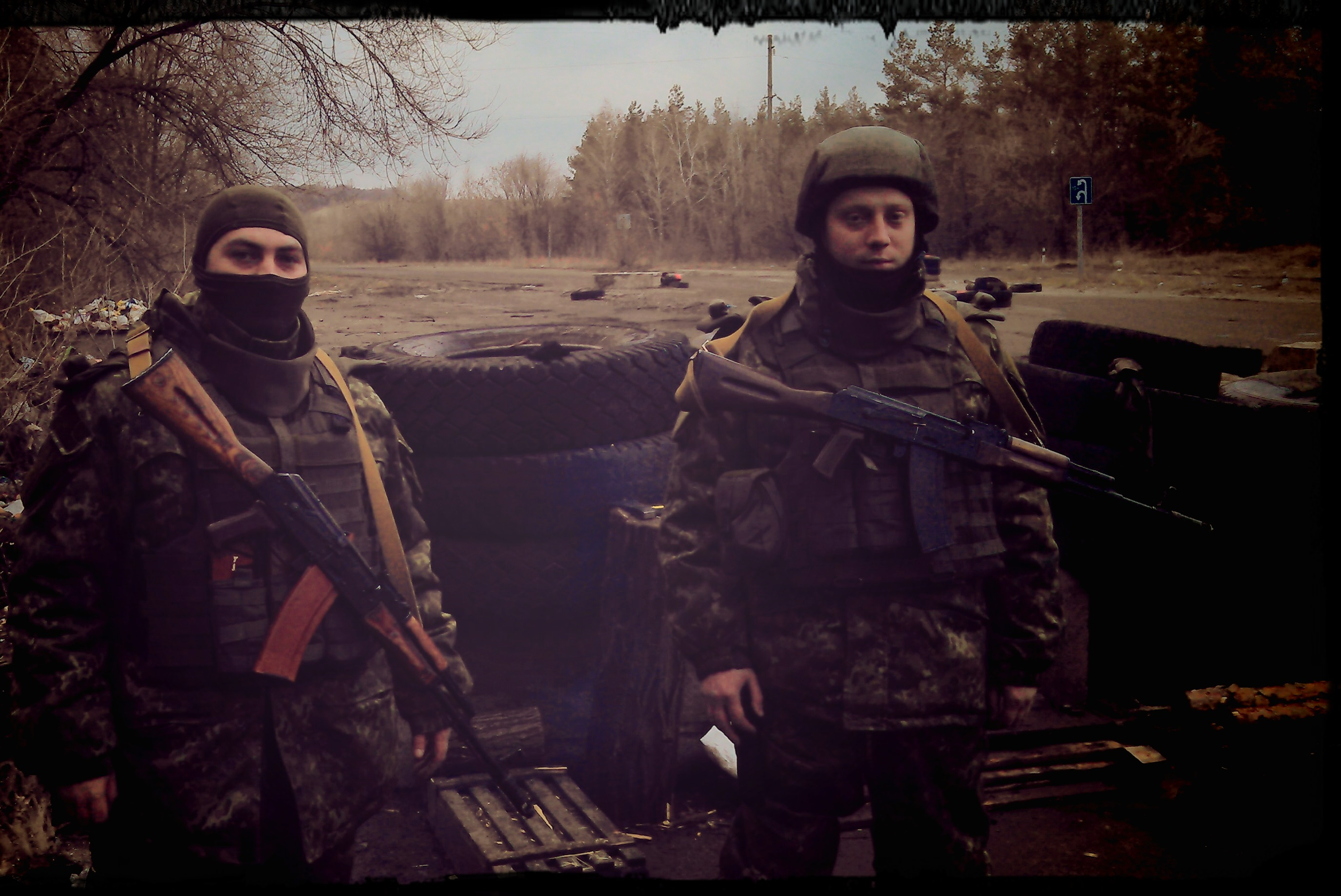 бійці спецпідрозділу Грифон несуть службу на блок-посту в м.Щастя під час бойових дій на Сході України.Зима 2014 року.